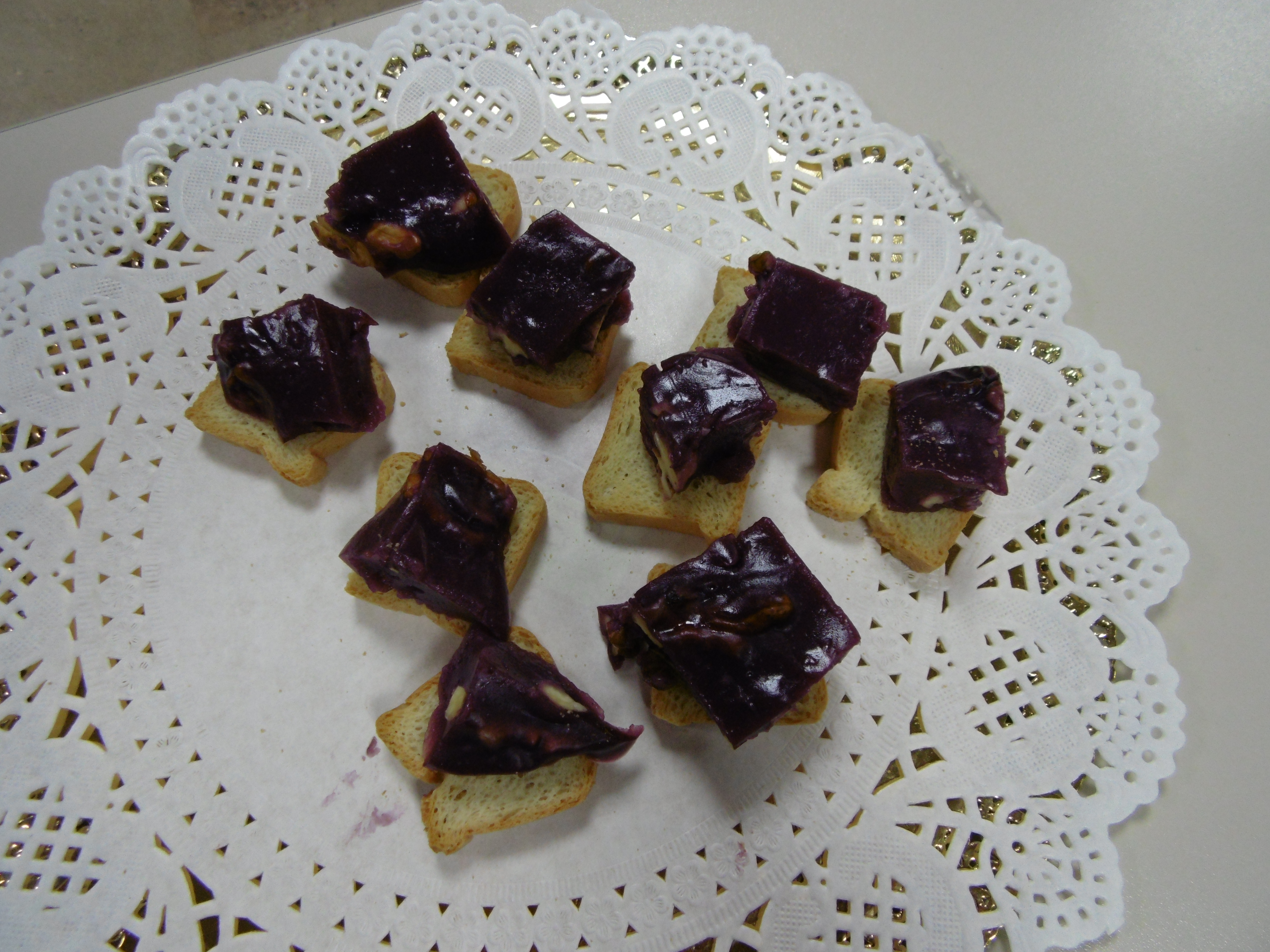 Mostillo del Pallars